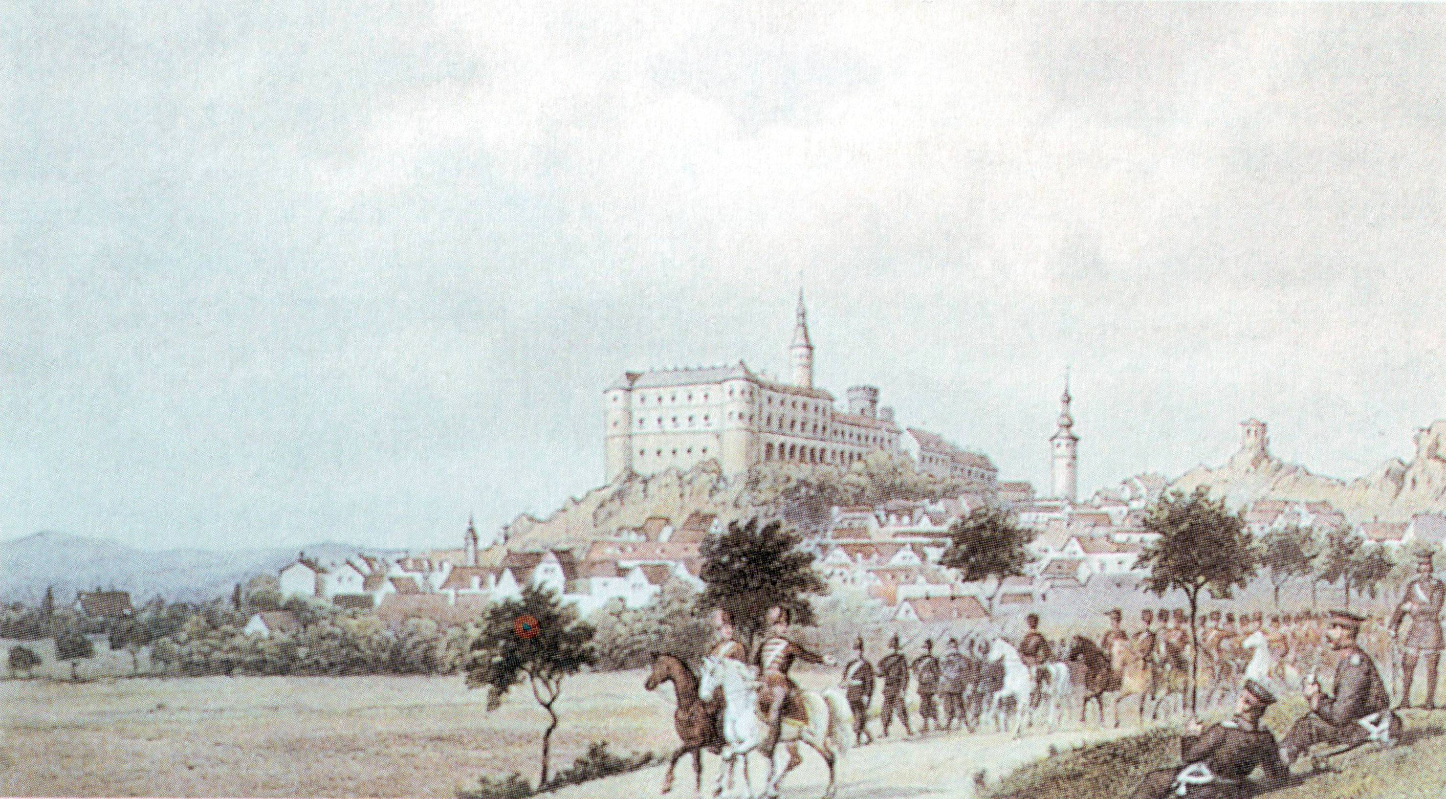 Lithographie, 1866. Preußische Truppen in Nikolsburg.